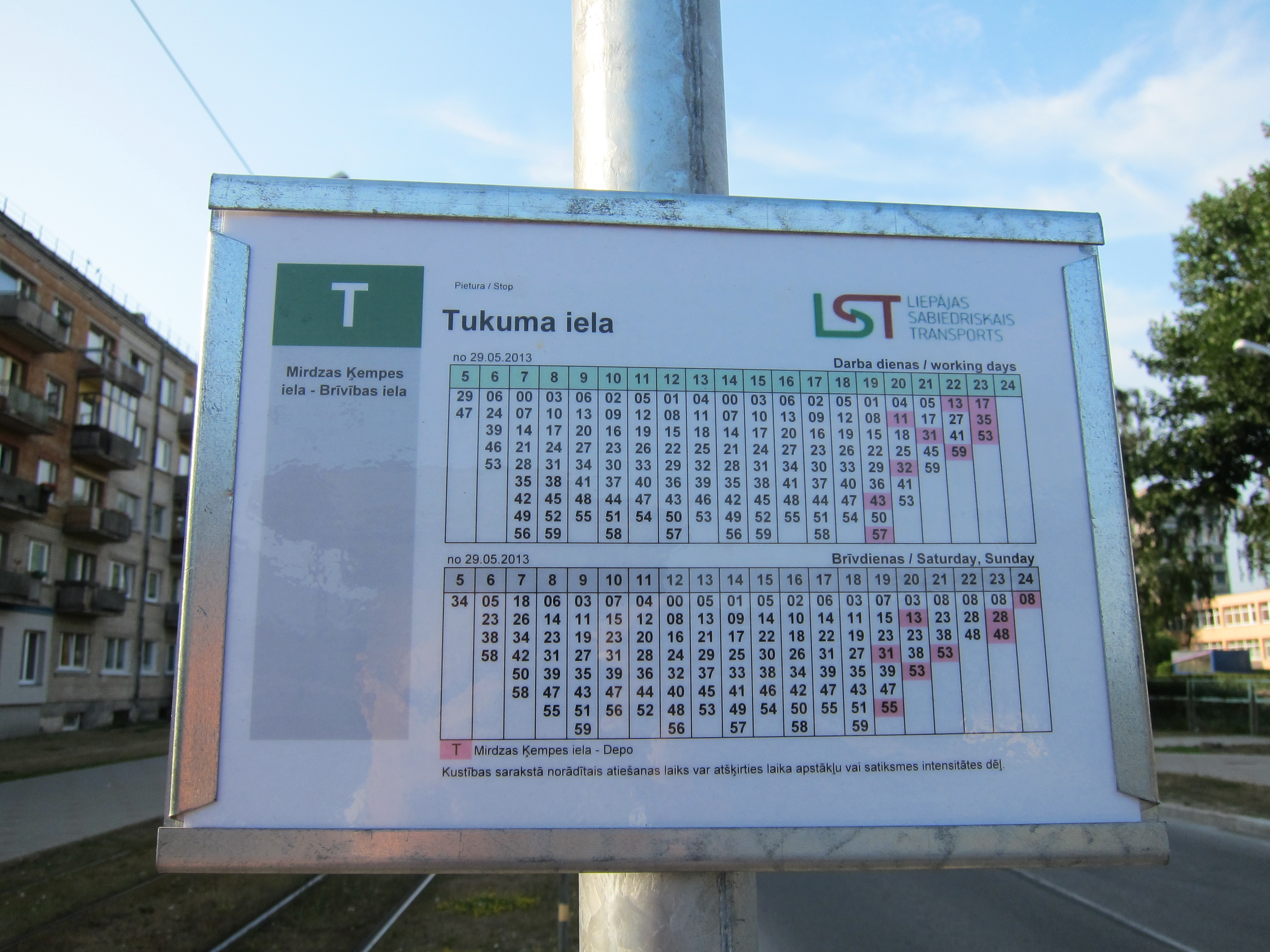 Tramvaja saraksts Tukuma ielā